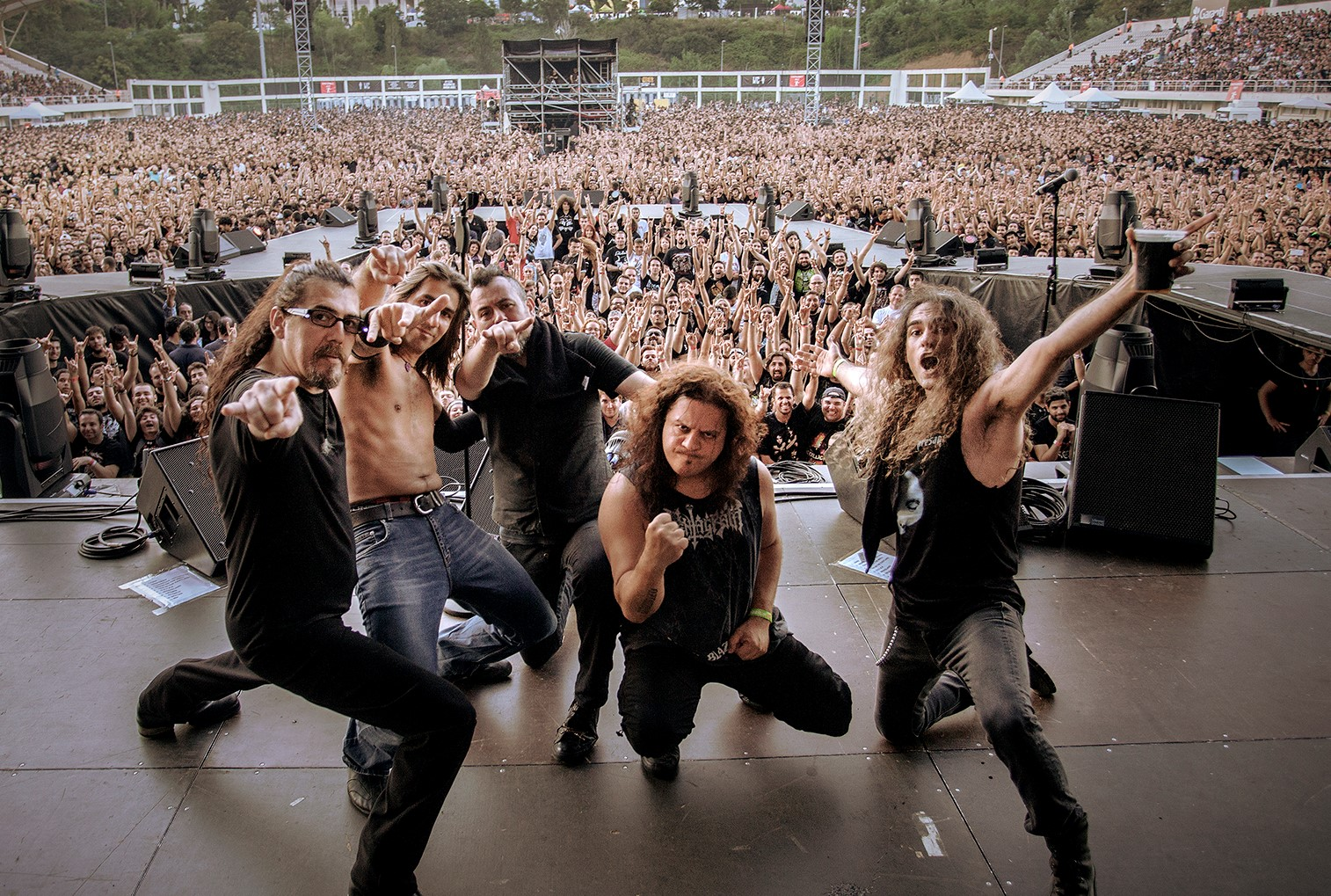 Pentagram (Müzik Grubu)